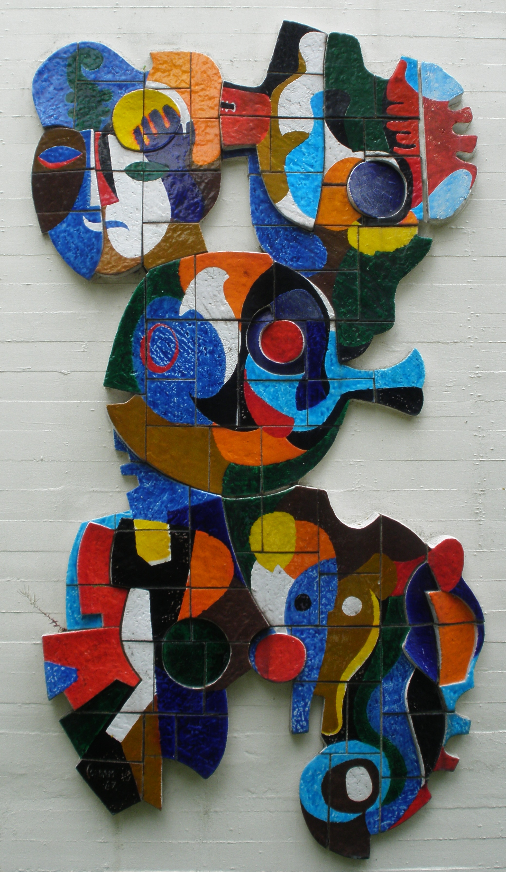 Kunstwerk van Cor Dam aan de Jozef Israelslaan 56 in Woerden.